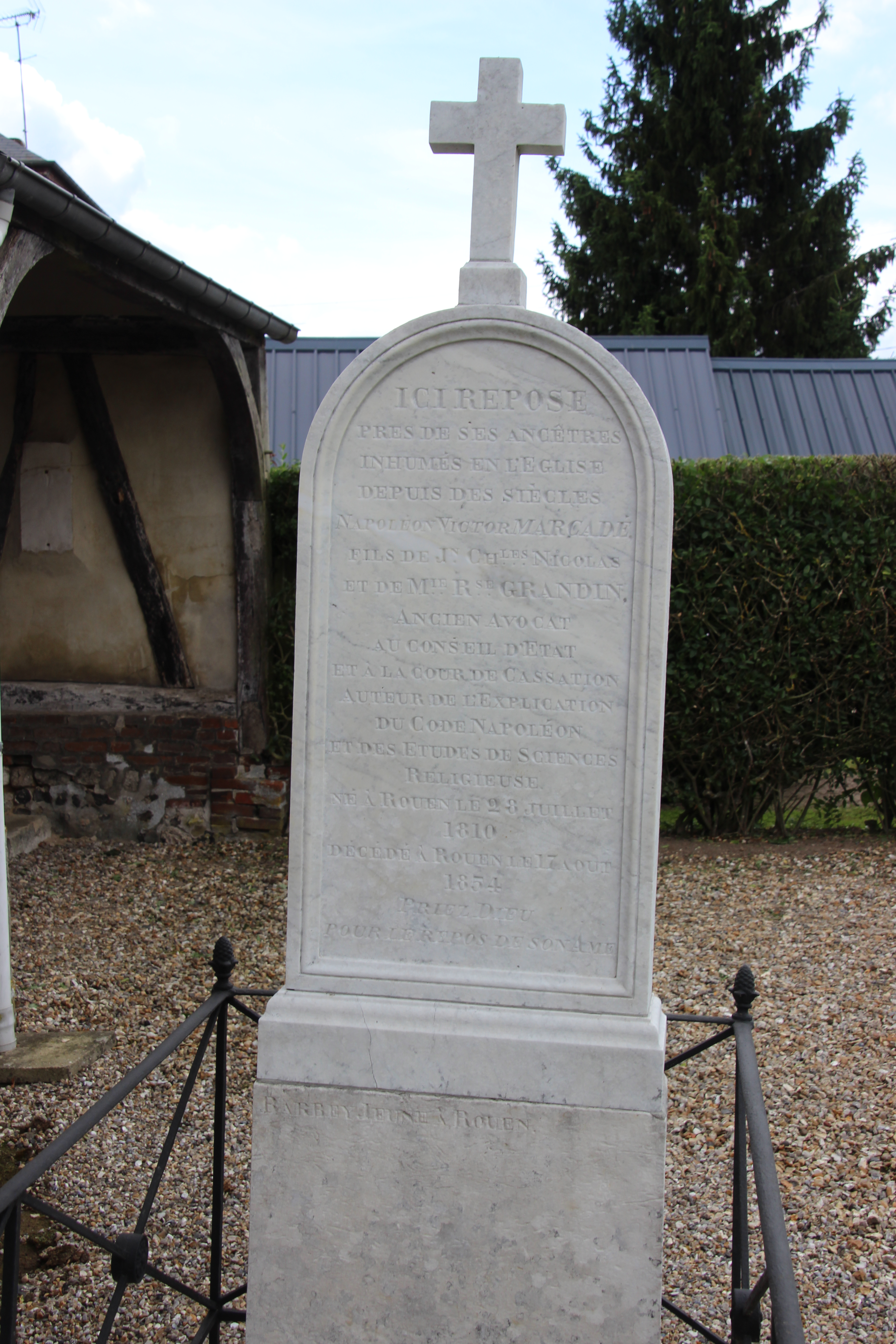 tombe de Napoléon Victor Marcadé à Saint-Germain-des-Essourts